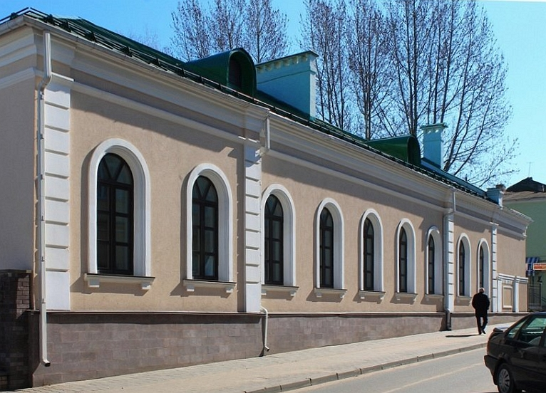 Пажарнае дэпо. Магілёў